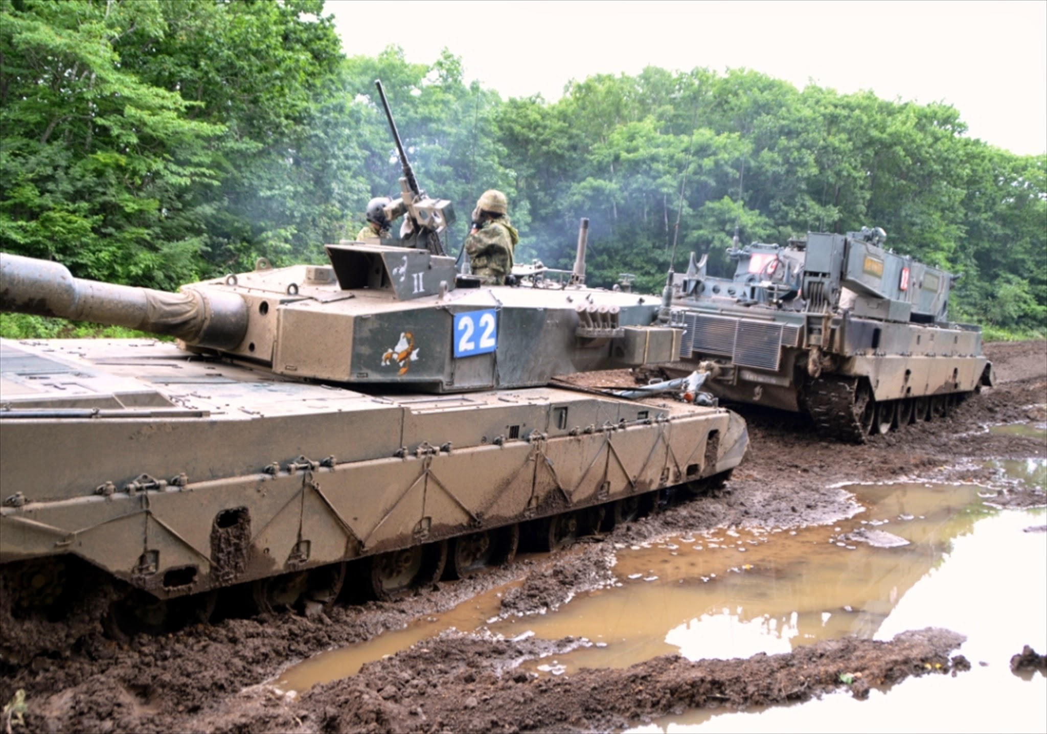 ９０式戦車回収車（戦車長距離機動・装備及び戦闘射撃訓練・第１戦車群）